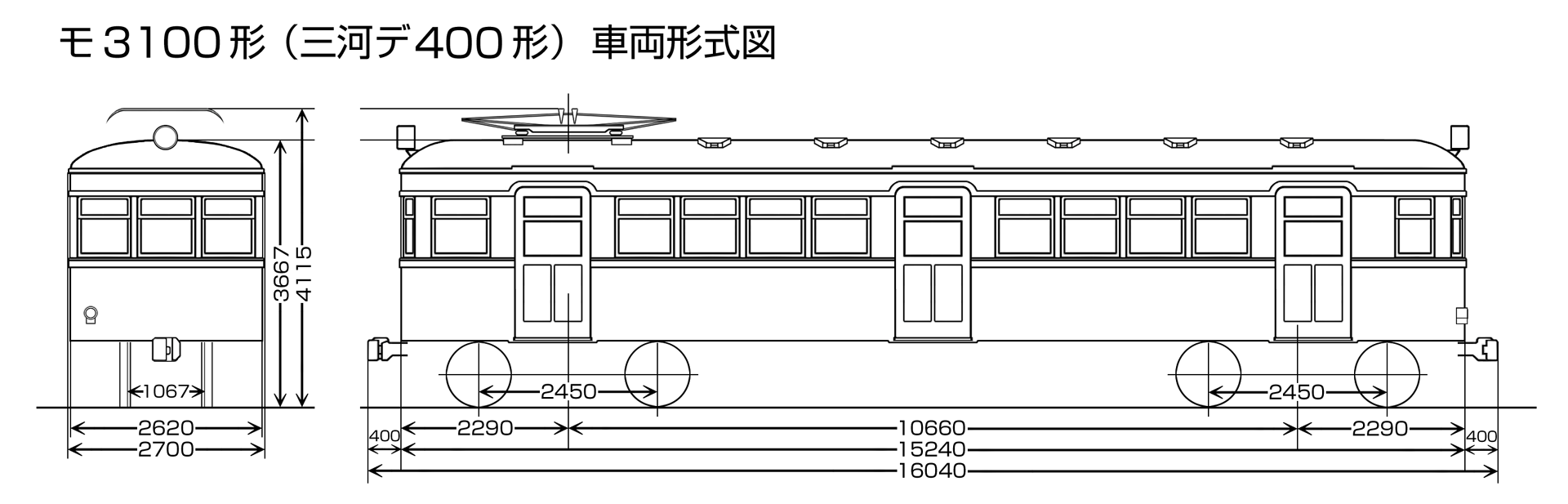 名鉄モ3100形電車（元三河鉄道デ400形）の車両形式図。